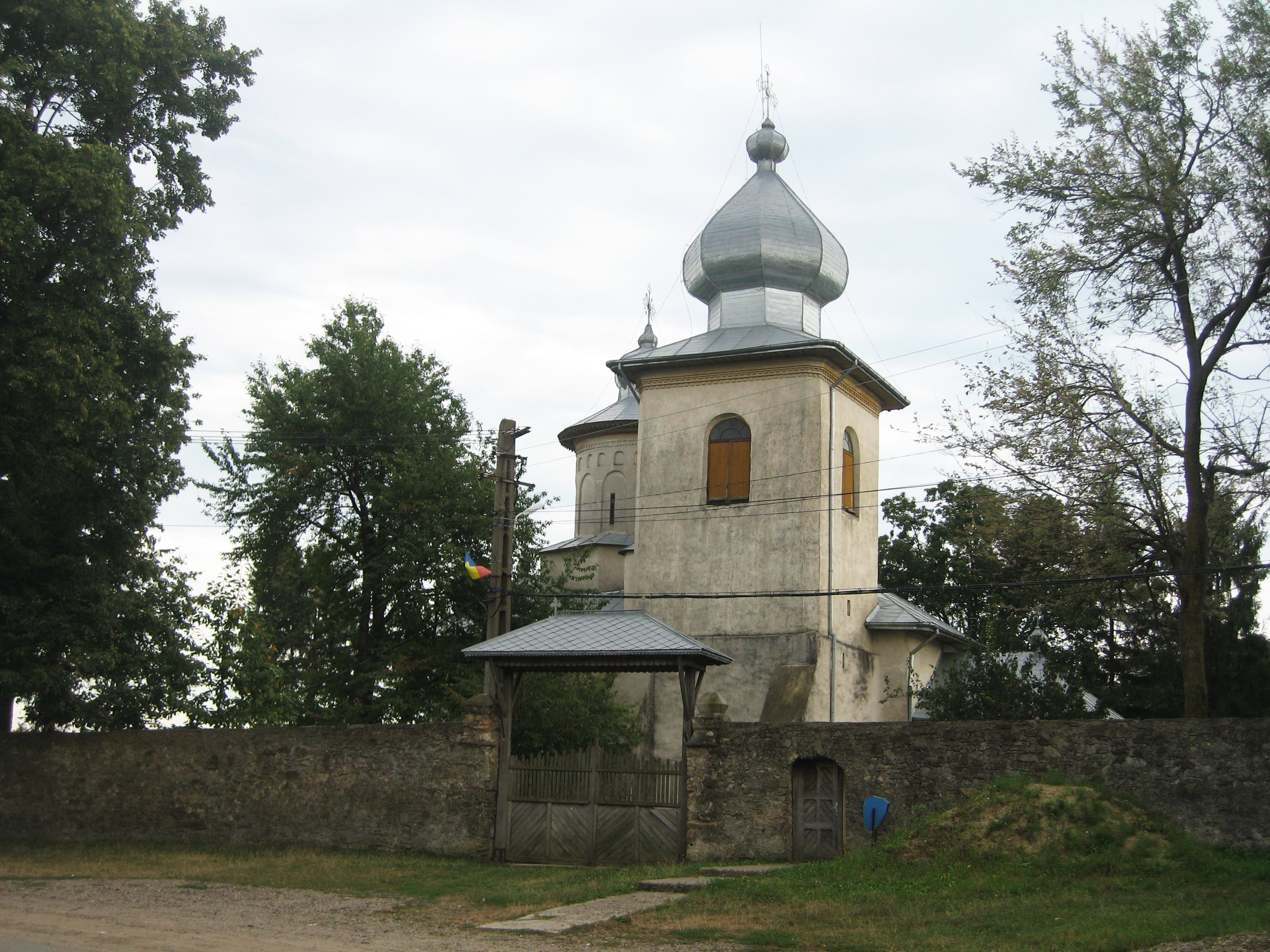 Biserica Duminica Tuturor Sfintilor din Hantesti